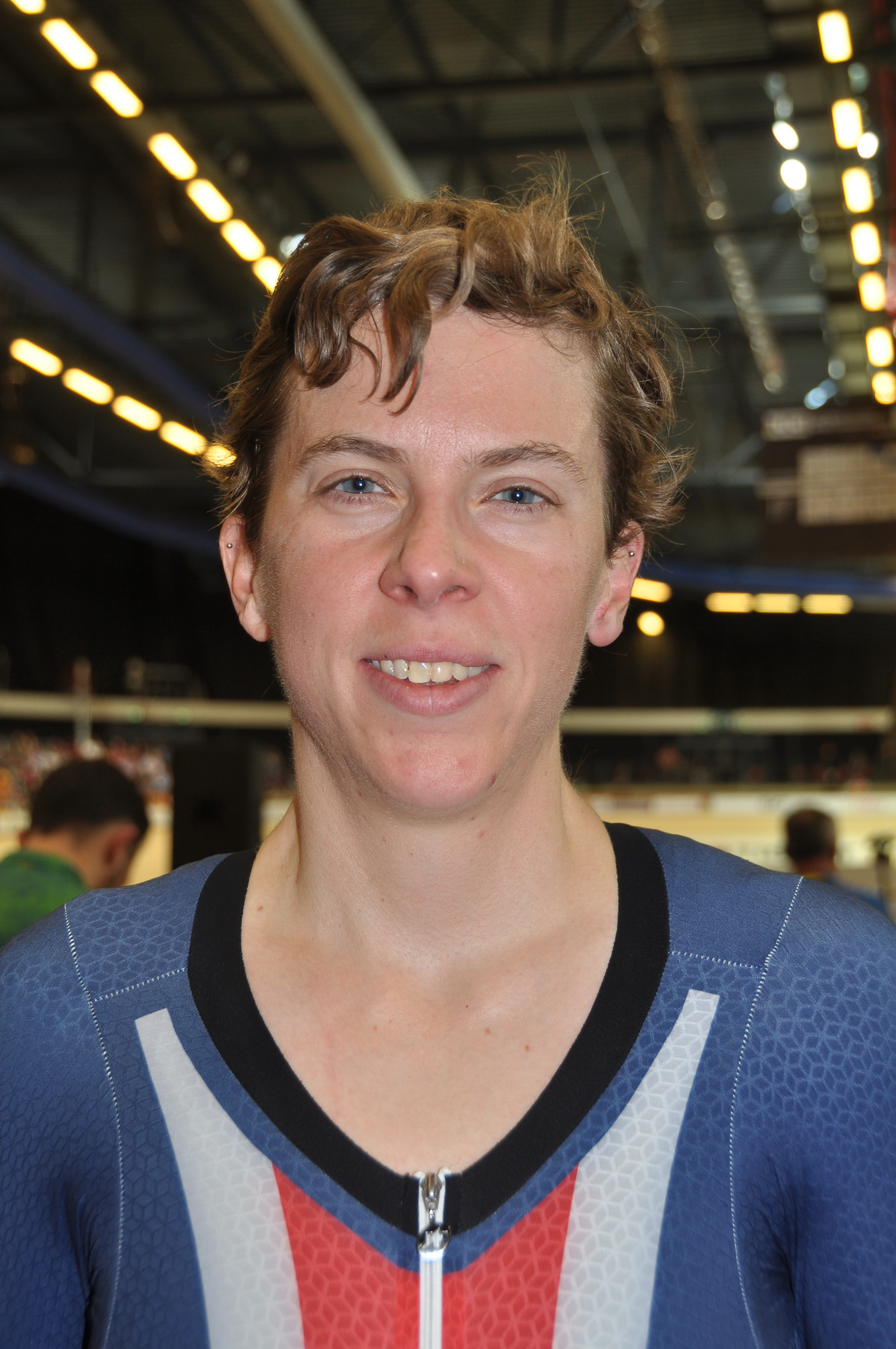 Kimberley Geist, US-amerikanische Radsportlerin